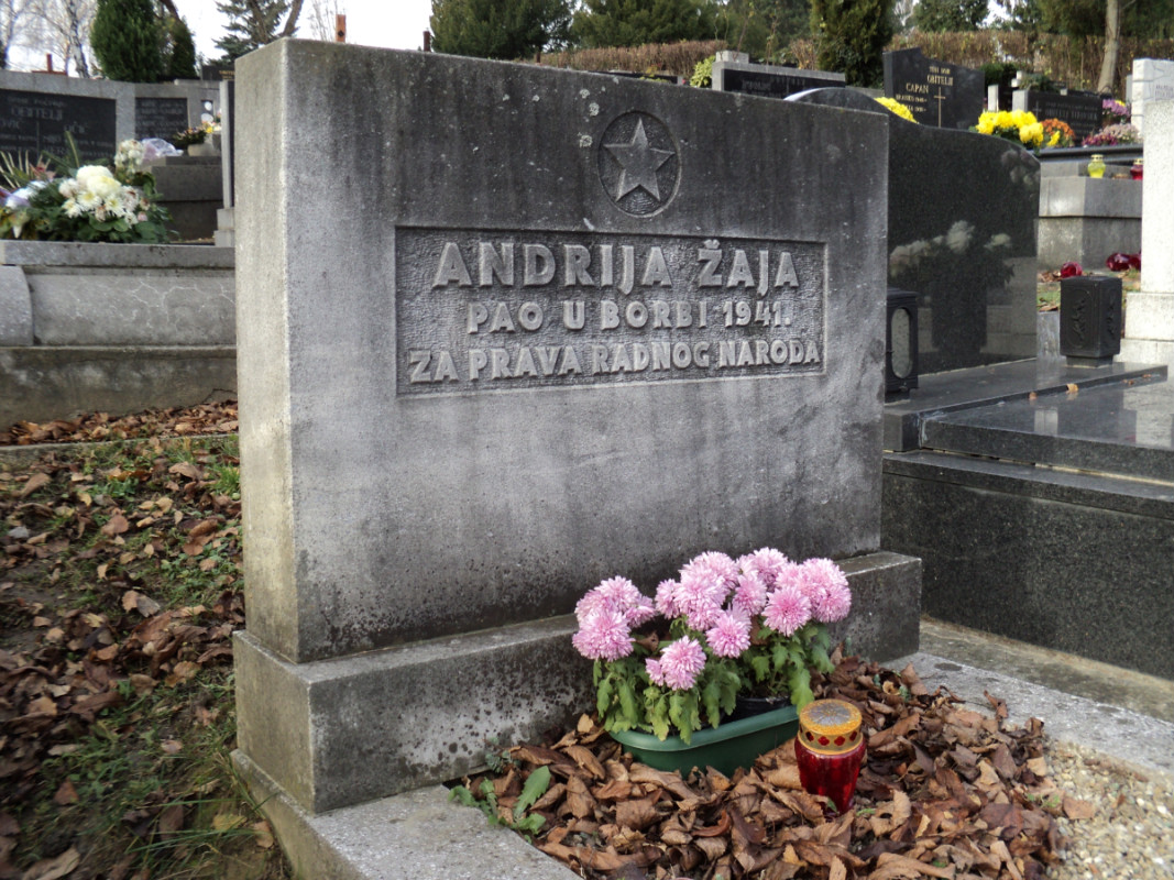 Grob Andrije Žaje